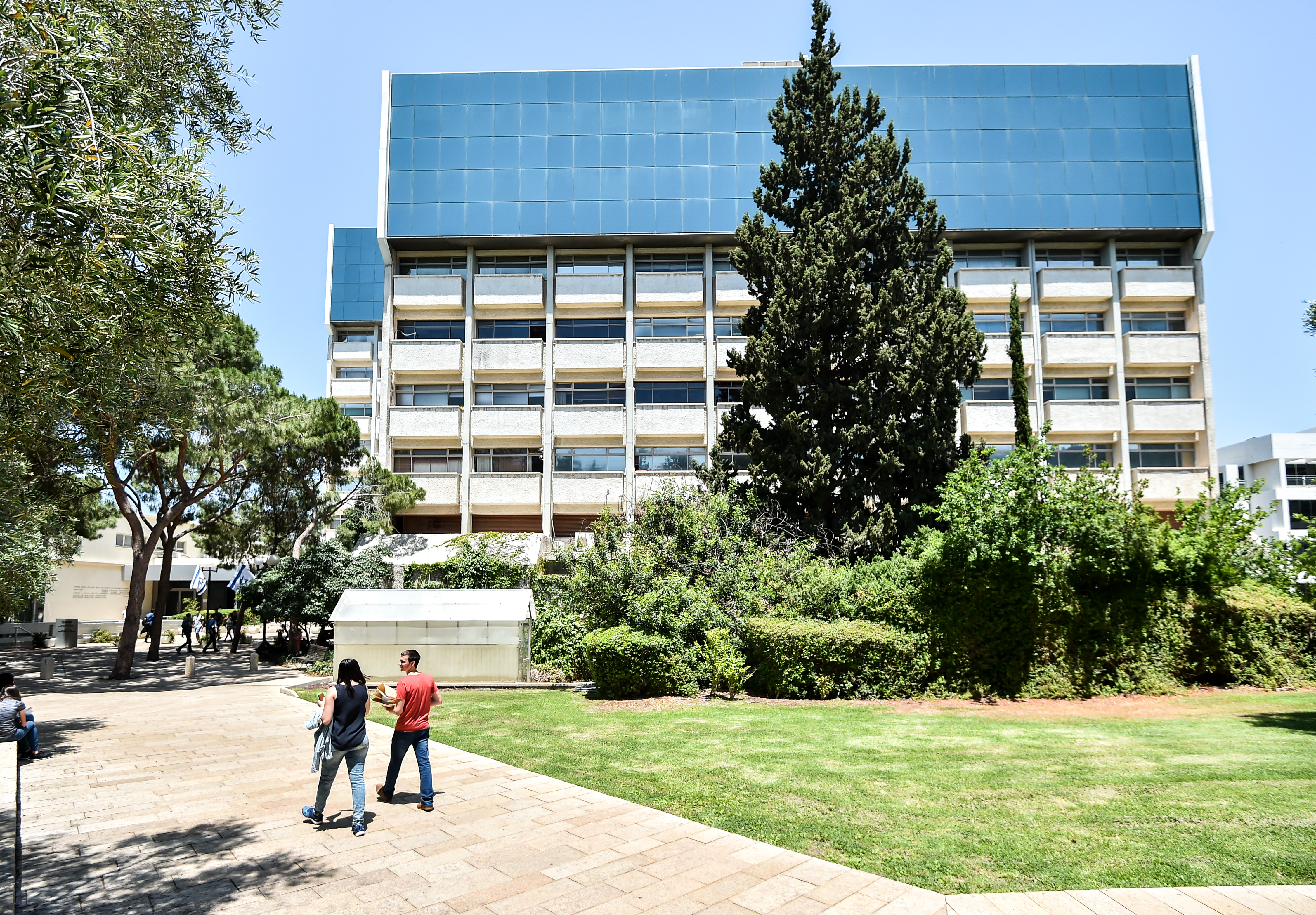 בניין בלה מאייר